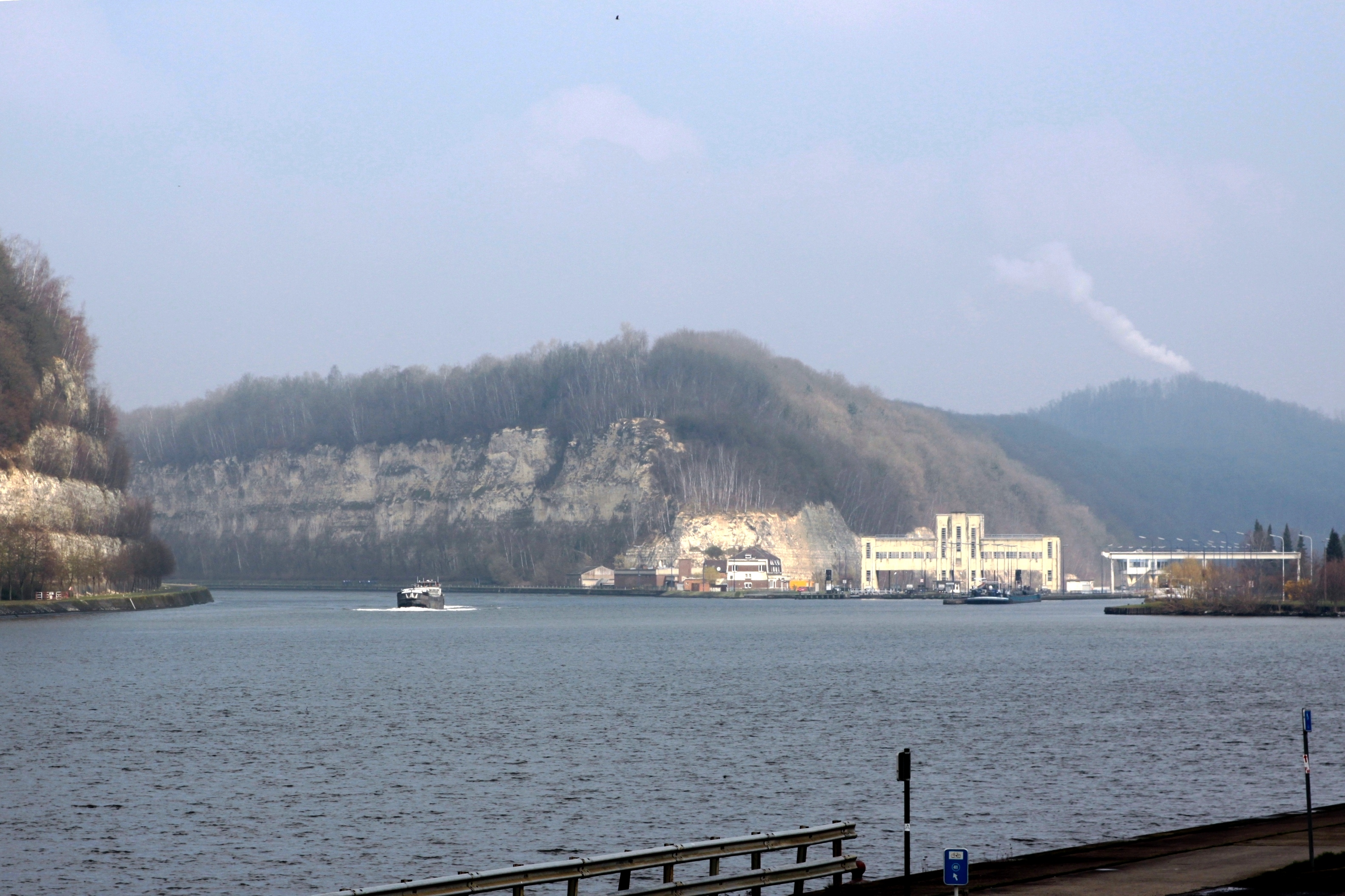 La Canal Albert et la tranchée de Caster à gauche. A droite les écluse de Lanaye.